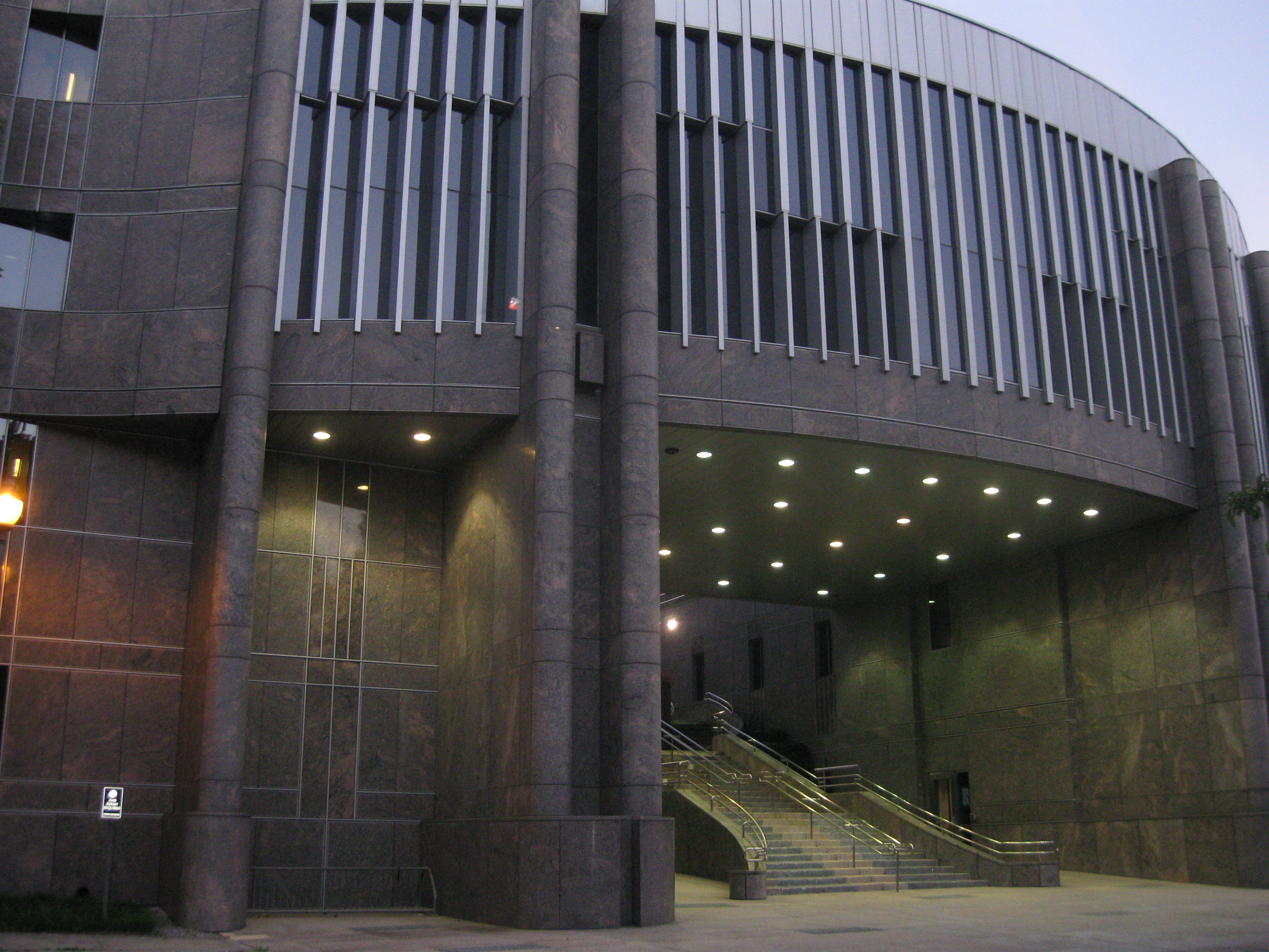 Duke Law